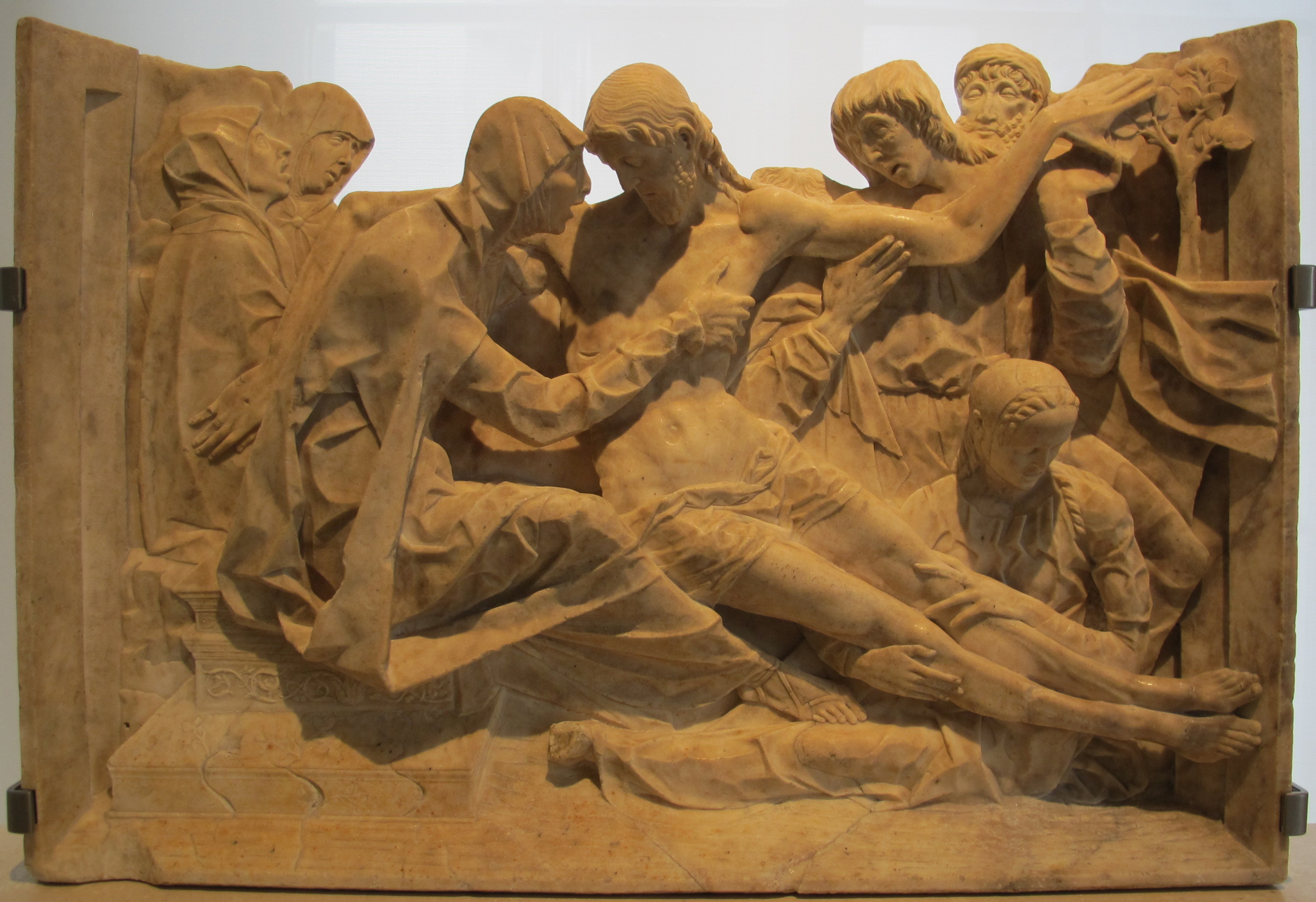 Cristoforo o antonio mantegazza, com pianto, 1475-1480 ca.